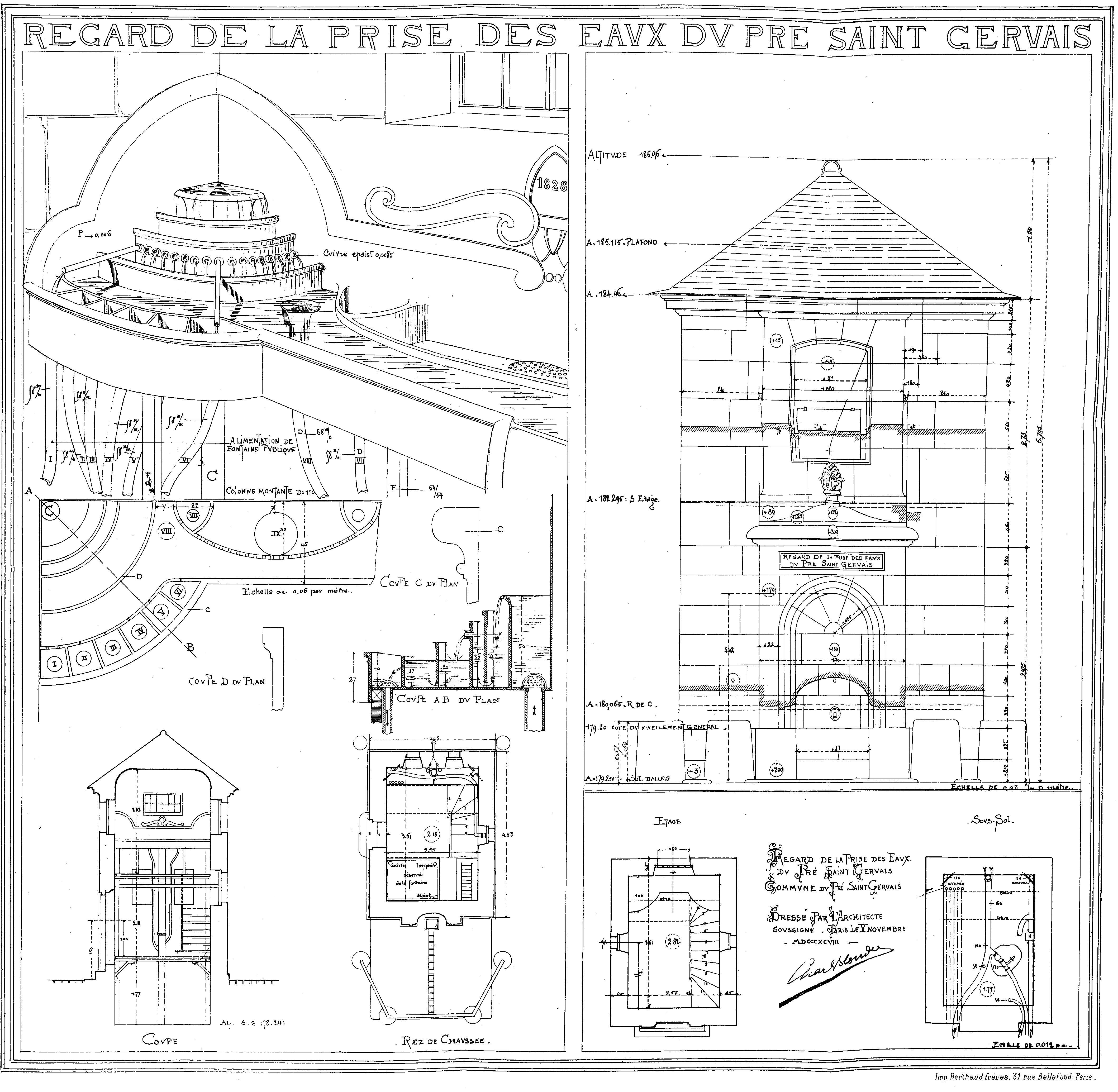 Plan du regard du Pré-Saint-Gervais. Plan extrait du procès-verbal de la Commission municipale du Vieux Paris, 10 novembre 1898